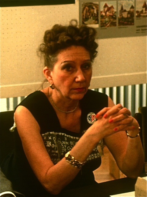 Portrait von Juliana Fabritius-Dancu